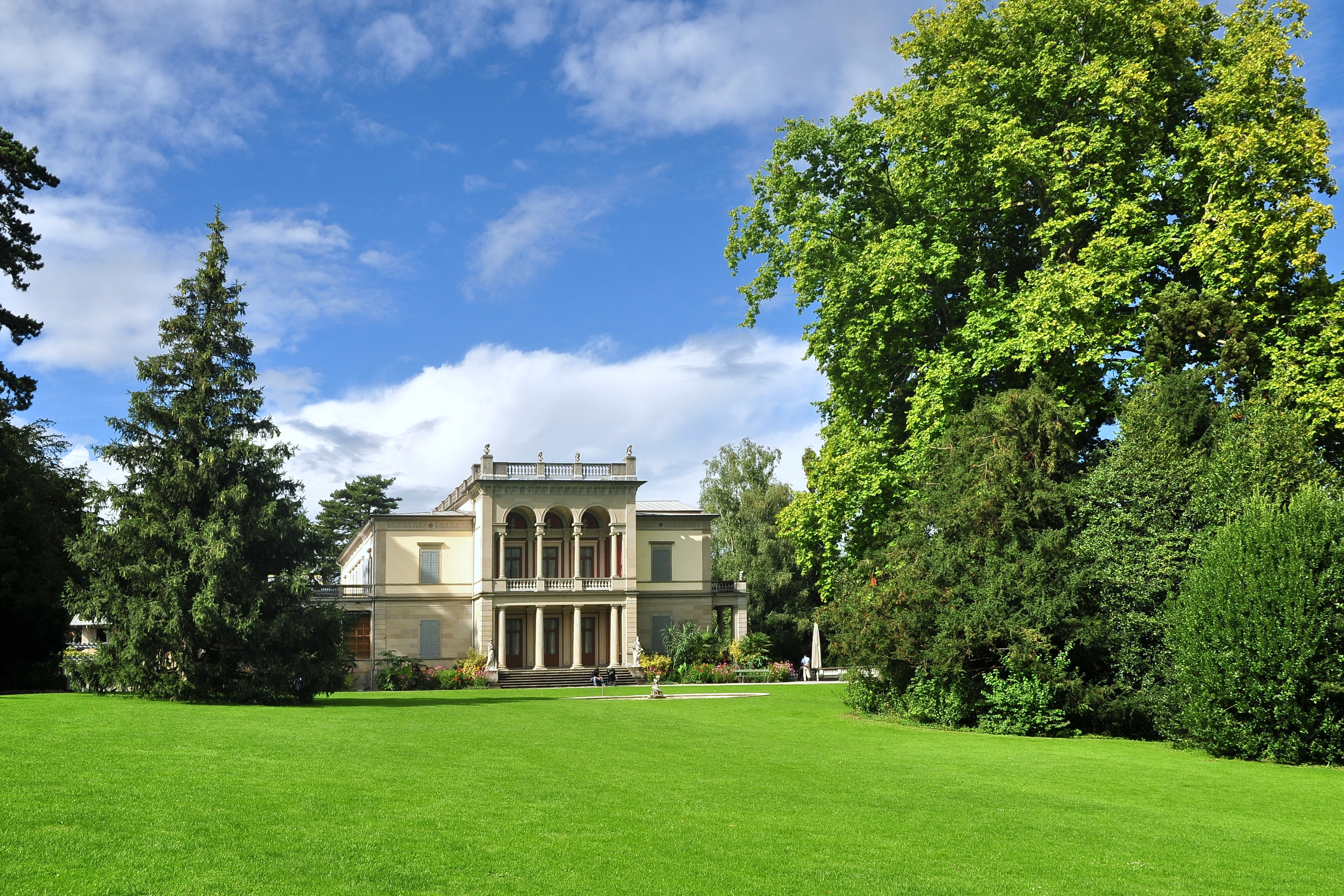 Museum Rietberg, Villa Wesendonck in Zürich (Switzerland)